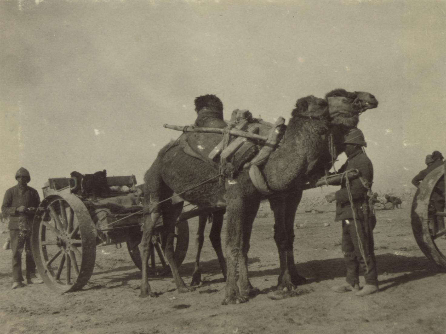 Camel transport, 1915. LC-DIG-ppmsca-13709-00014 (digital file from original on page 6, no.13)